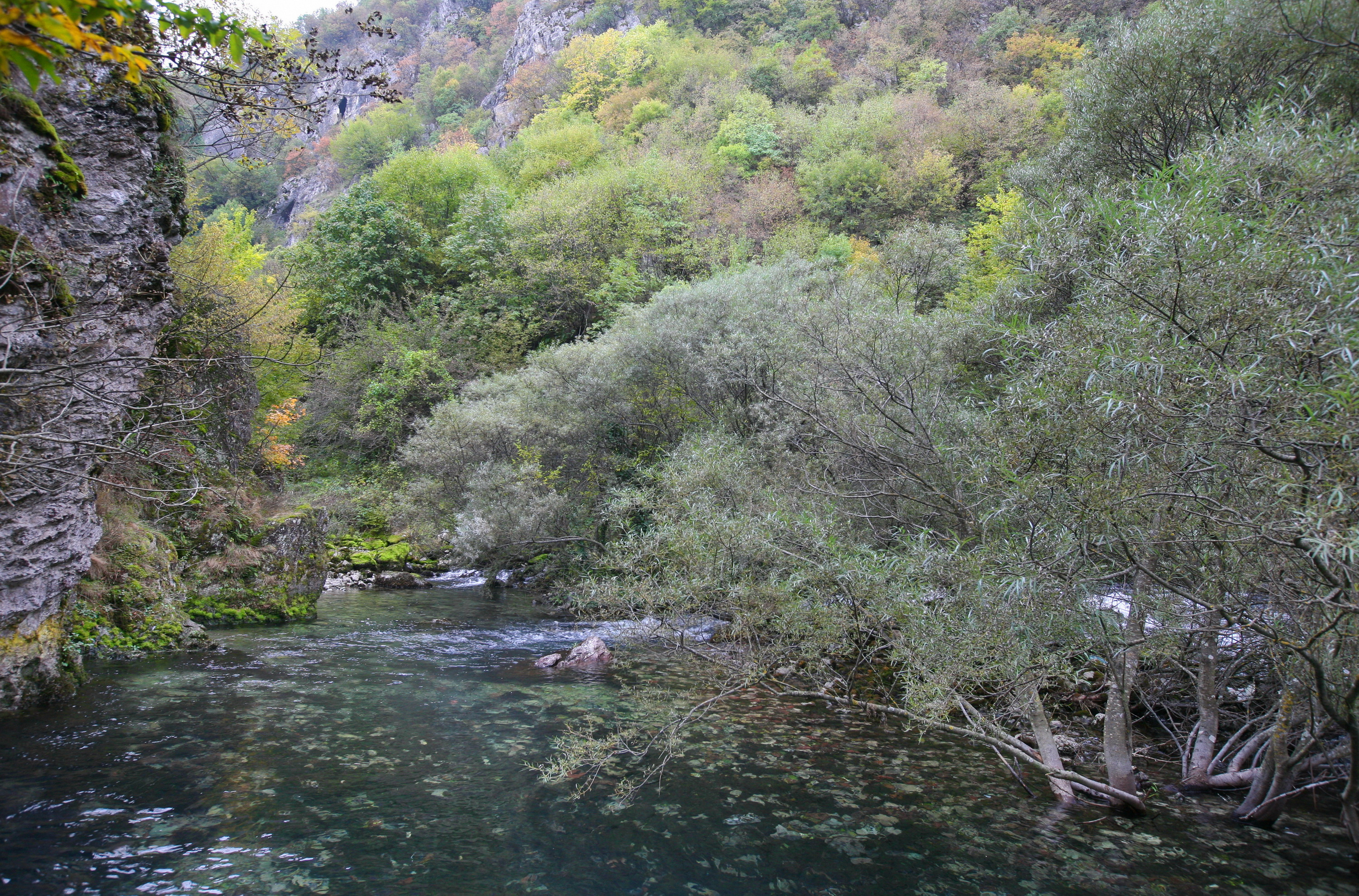 Bijeli Drim (Drin) 27. listopada 2011. 2011 S 618 KosDrin 17